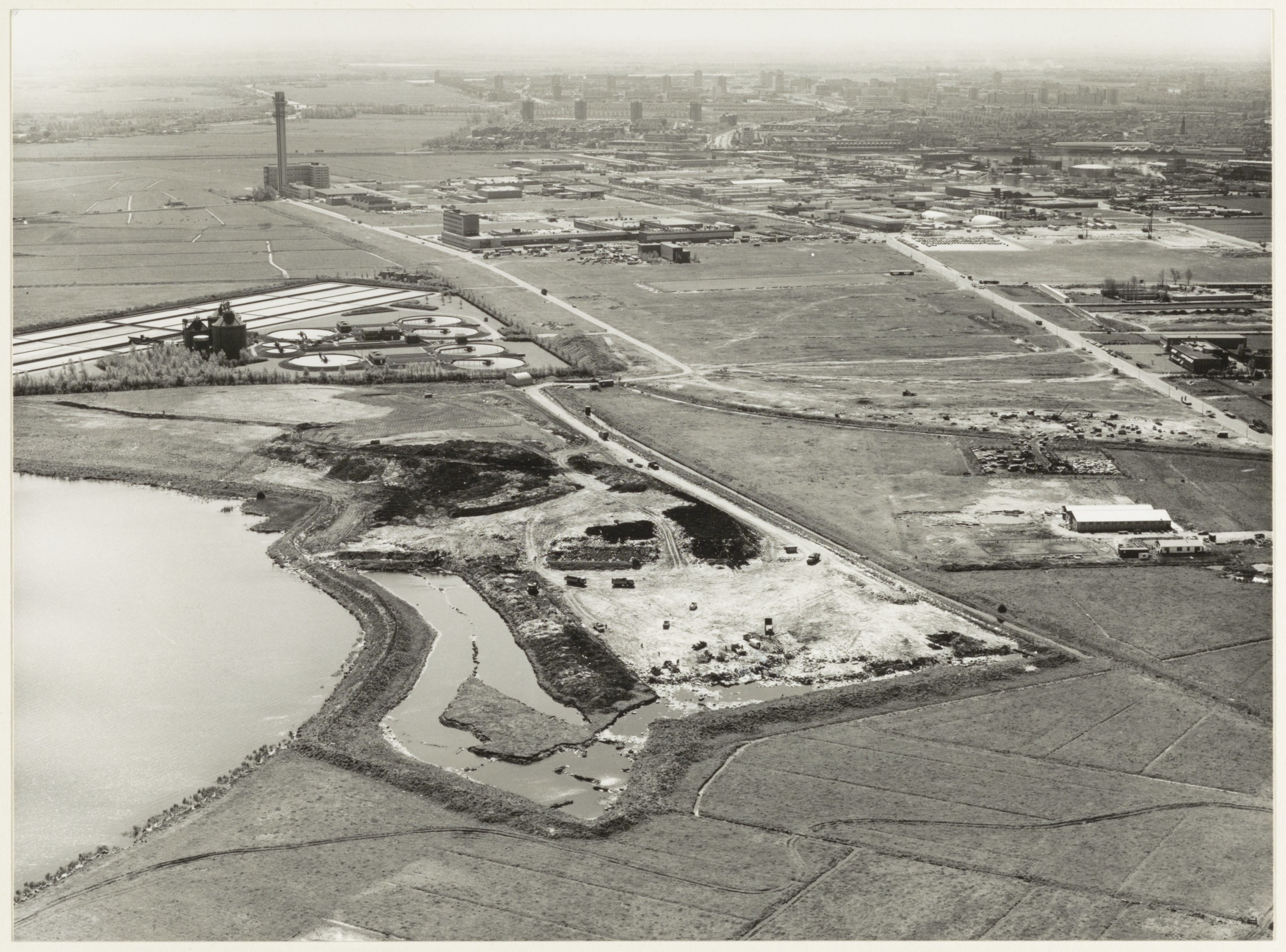 CollectieCollectie Fotoburo de BoerInventarisnummerNL-HlmNHA_54005134BeschrijvingWaarderpolder: overzicht van het noord-oostelijk gedeelte met Parkwijk op de achtergrond.FotonummerNL-HlmNHA_1478_5313DocumenttypeTopografische prenten, tekeningen en foto'sVervaardigerBoer, Cees de (1918-1985) Soort vervaardigerFotograaf LandNederland ProvincieNoord-Holland GemeenteHaarlem PlaatsHaarlem GeografischWaarderpolder Begindatum1977Einddatum1977TechniekFoto TrefwoordenPanorama's en profielen